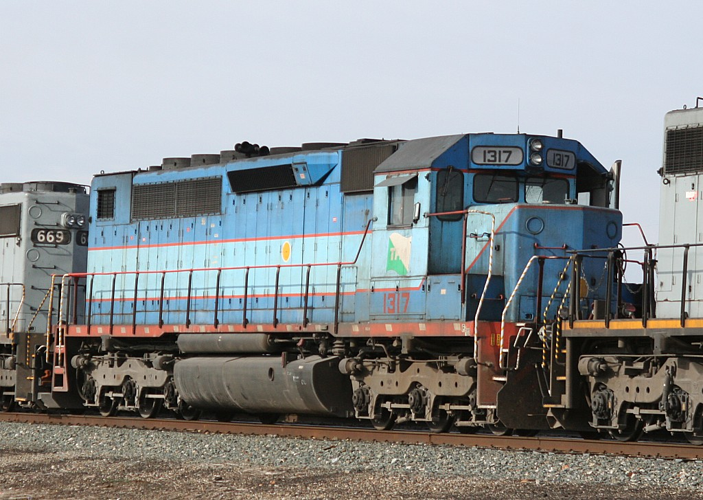 Grupo Transportación Ferroviaria Mexicana railroad 1317 EMD SDP40